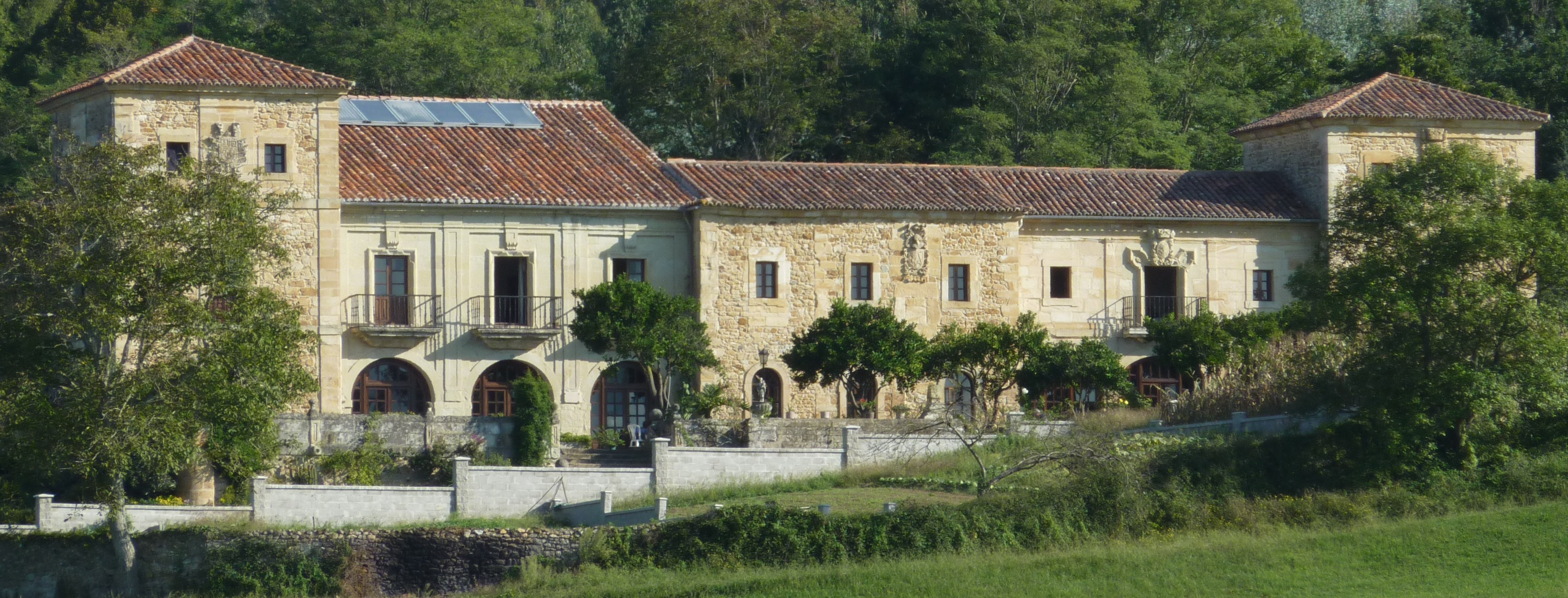 Edificio.Portada.